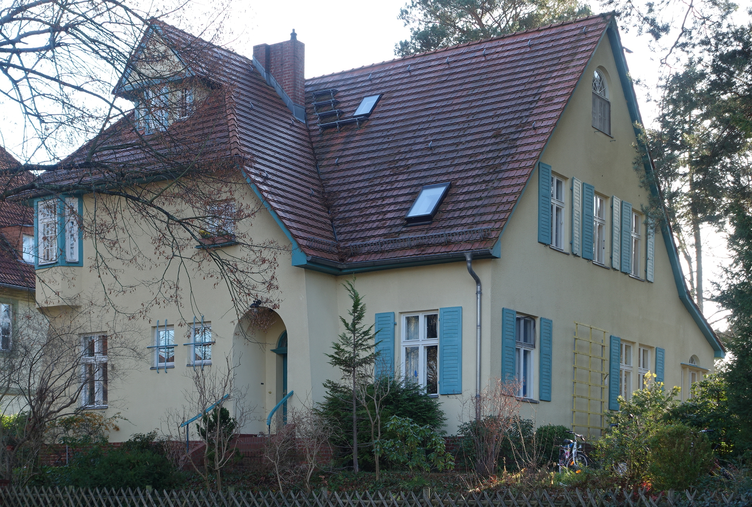 Wohnhaus